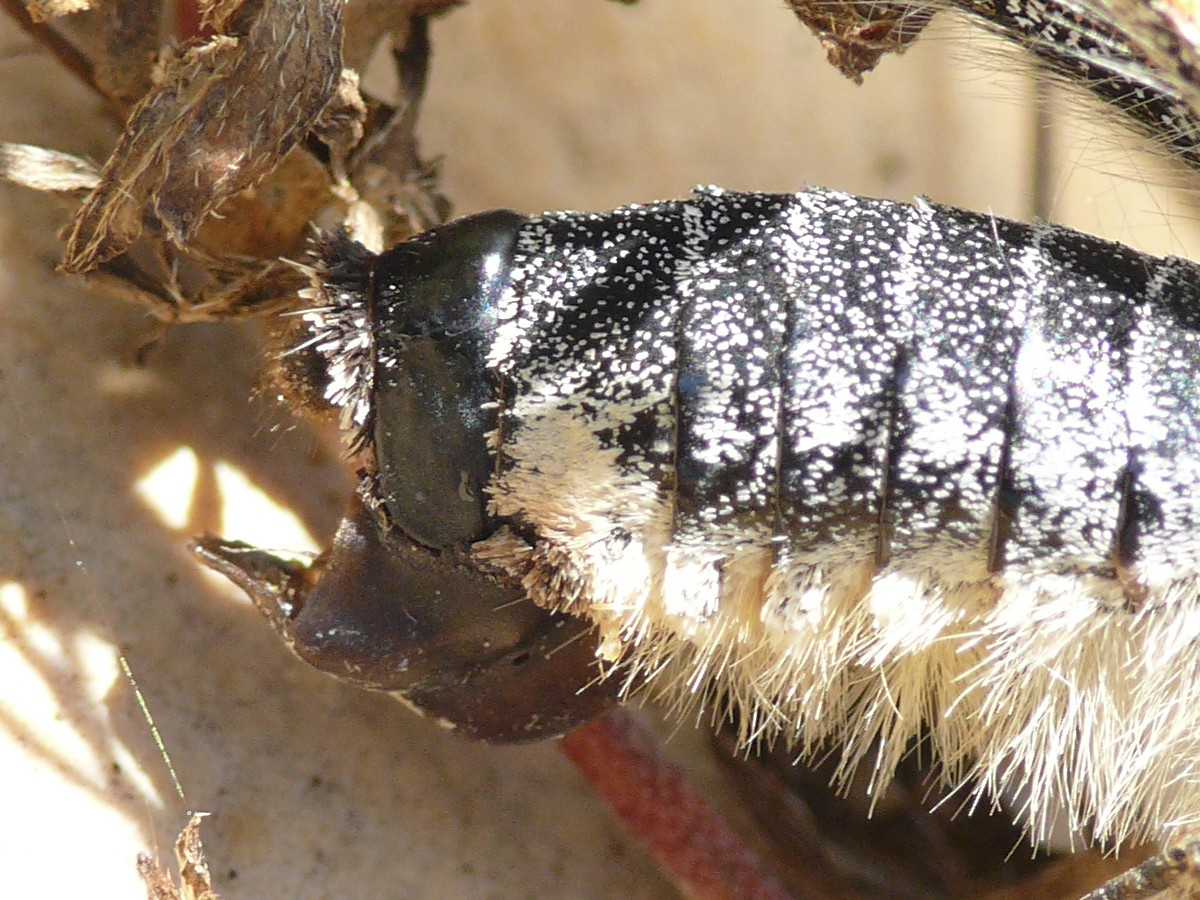 Parnassius apollo